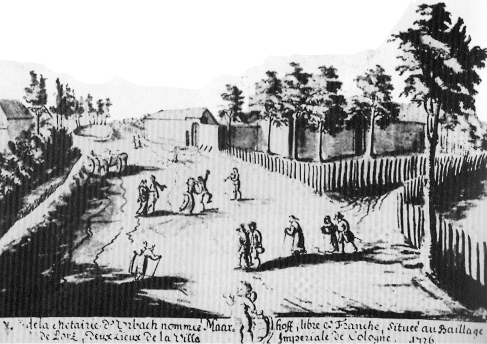 Die Zeichnung zeigt die Frankfurter Straße in Urbach mit der Kreuzung zur heutigen Kaiserstraße in Köln-Porz. Untertitel lautet:"dela chetaizie d'Urbach nommee Maarhoff, libre ? Franche, Situeé au Baillage de Porz, Deux Lieux de la Ville Imperiale de Cologne 1726"